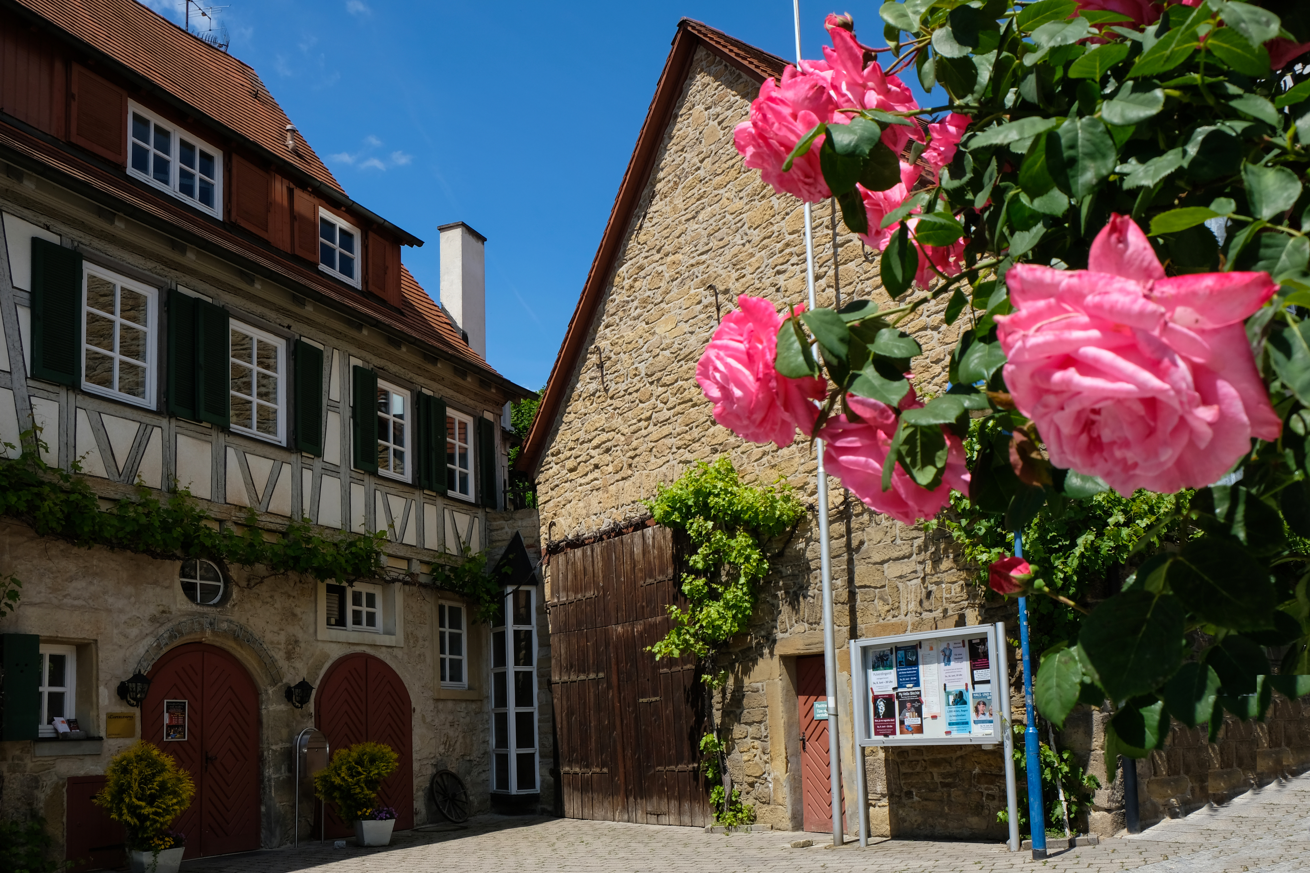 Außenansicht Das Glasperlenspiel in Asperg e.V. im Mai 2019. Foto GPS